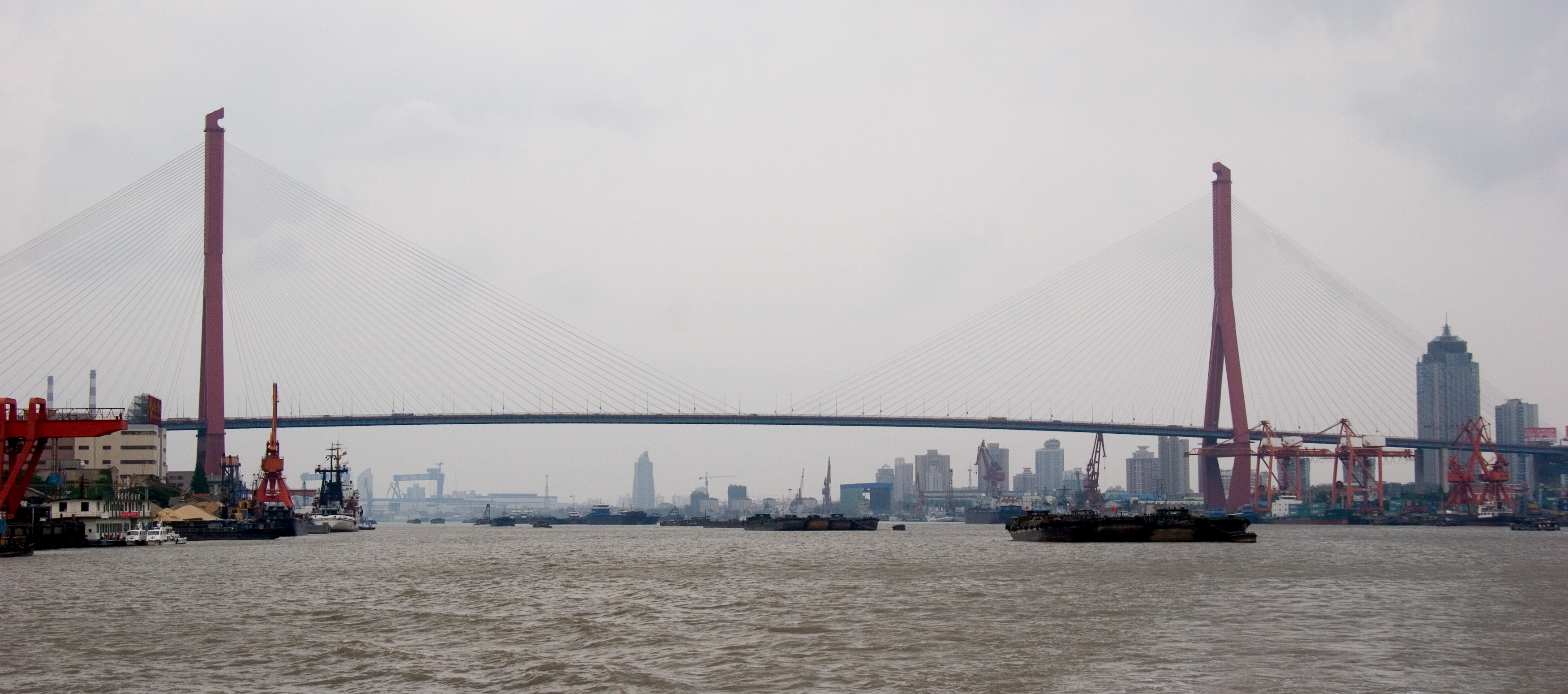 Yangpu Bridge in Shanghai, China